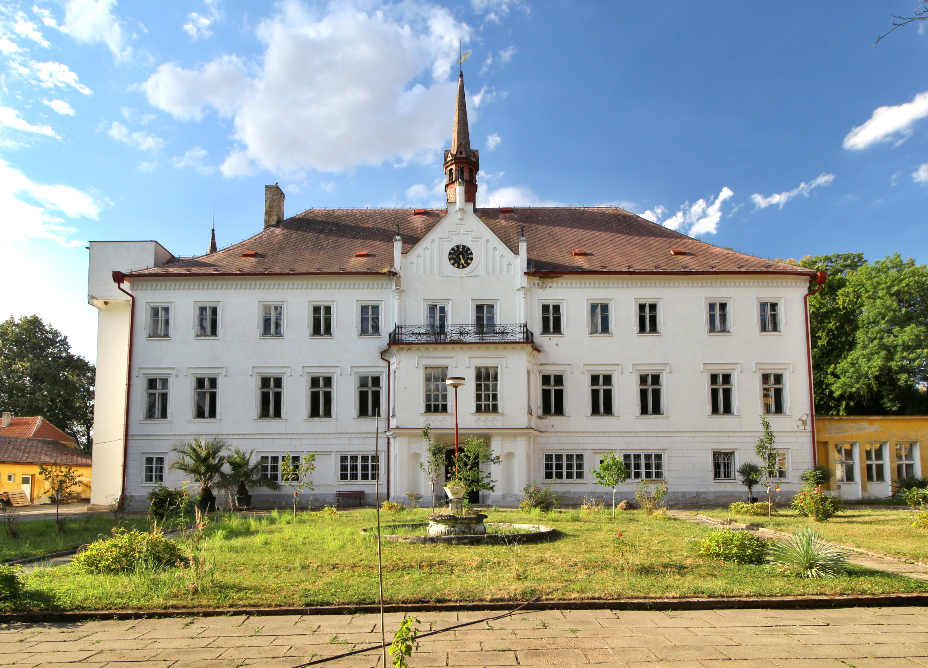 Zámek Řepín